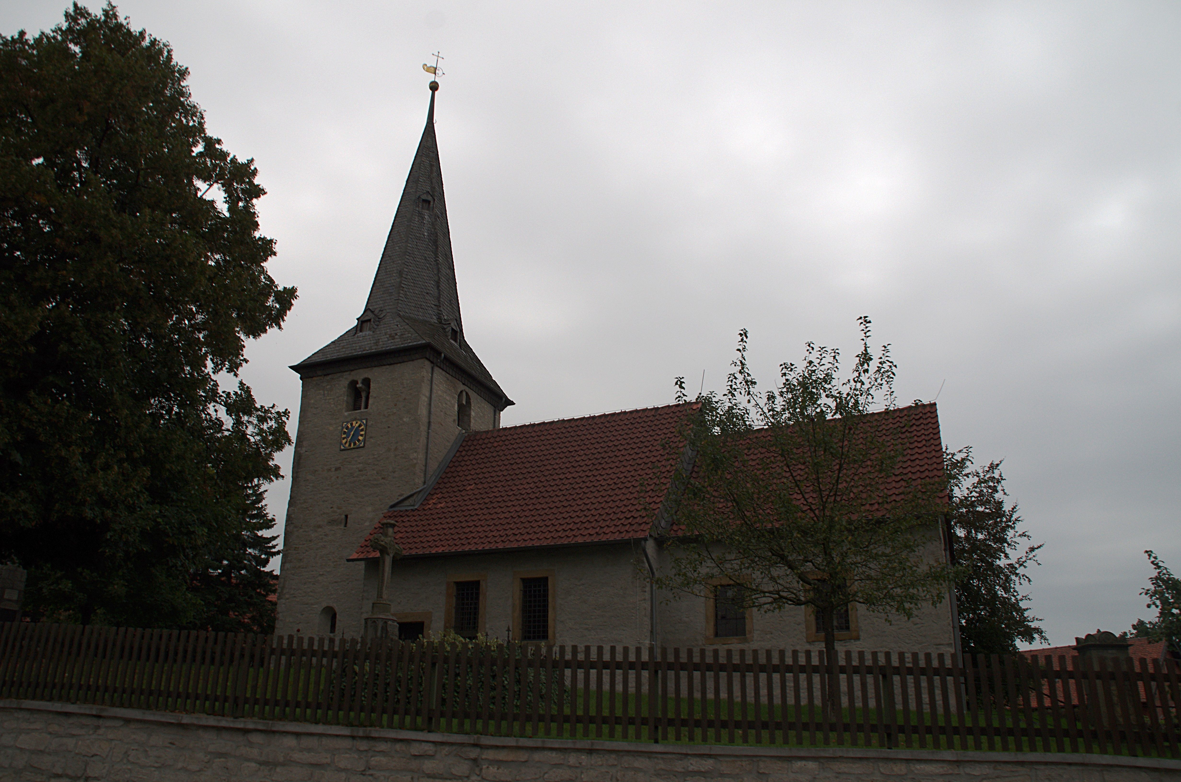 Elbe in Niedersachsen. Der Ort befindet sich im Landkreis Wolfenbüttel.